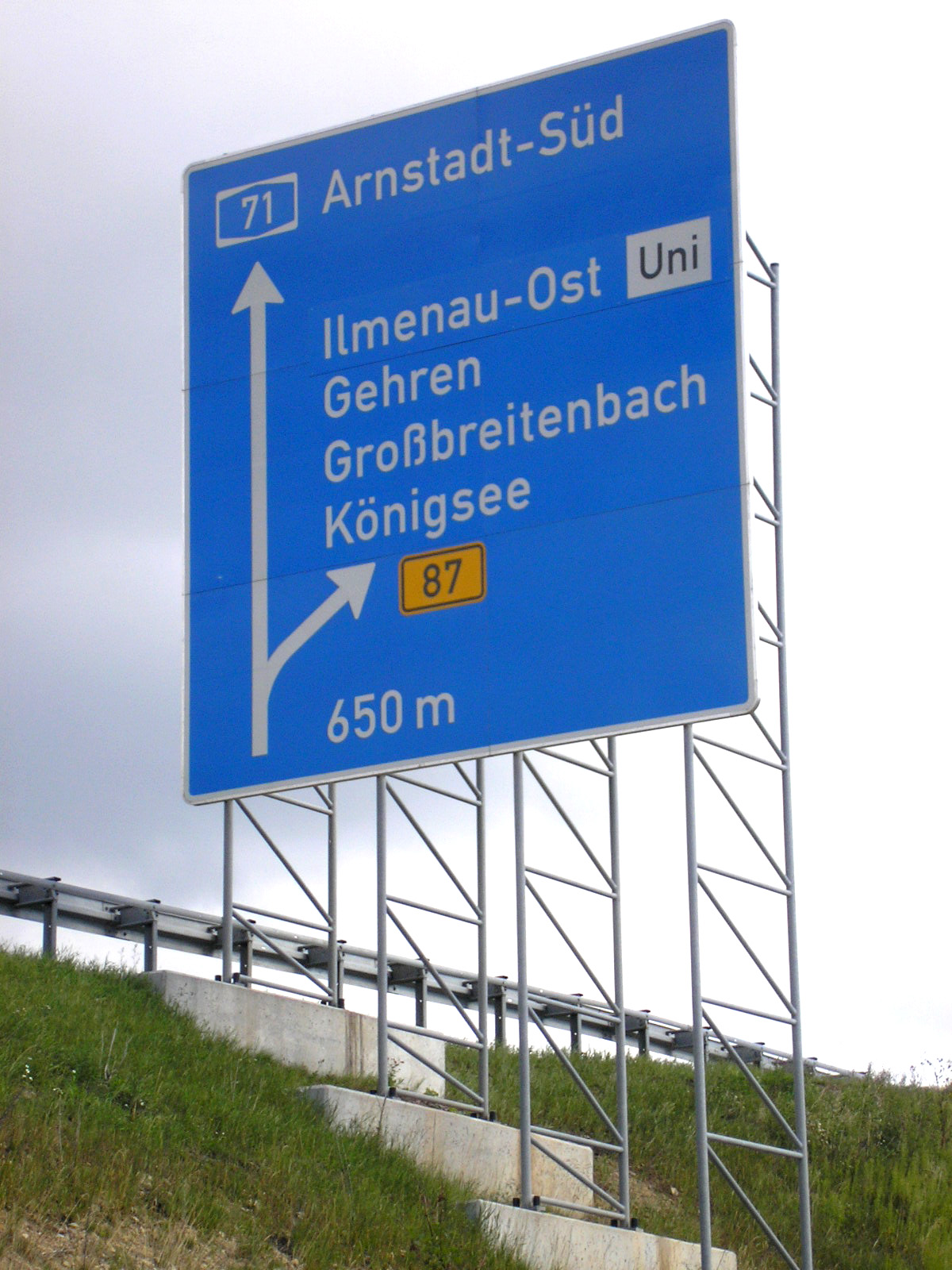 Schild zur Anschlussstelle Ilmenau-Ost (A71) bei Ilmenau (Thüringen).